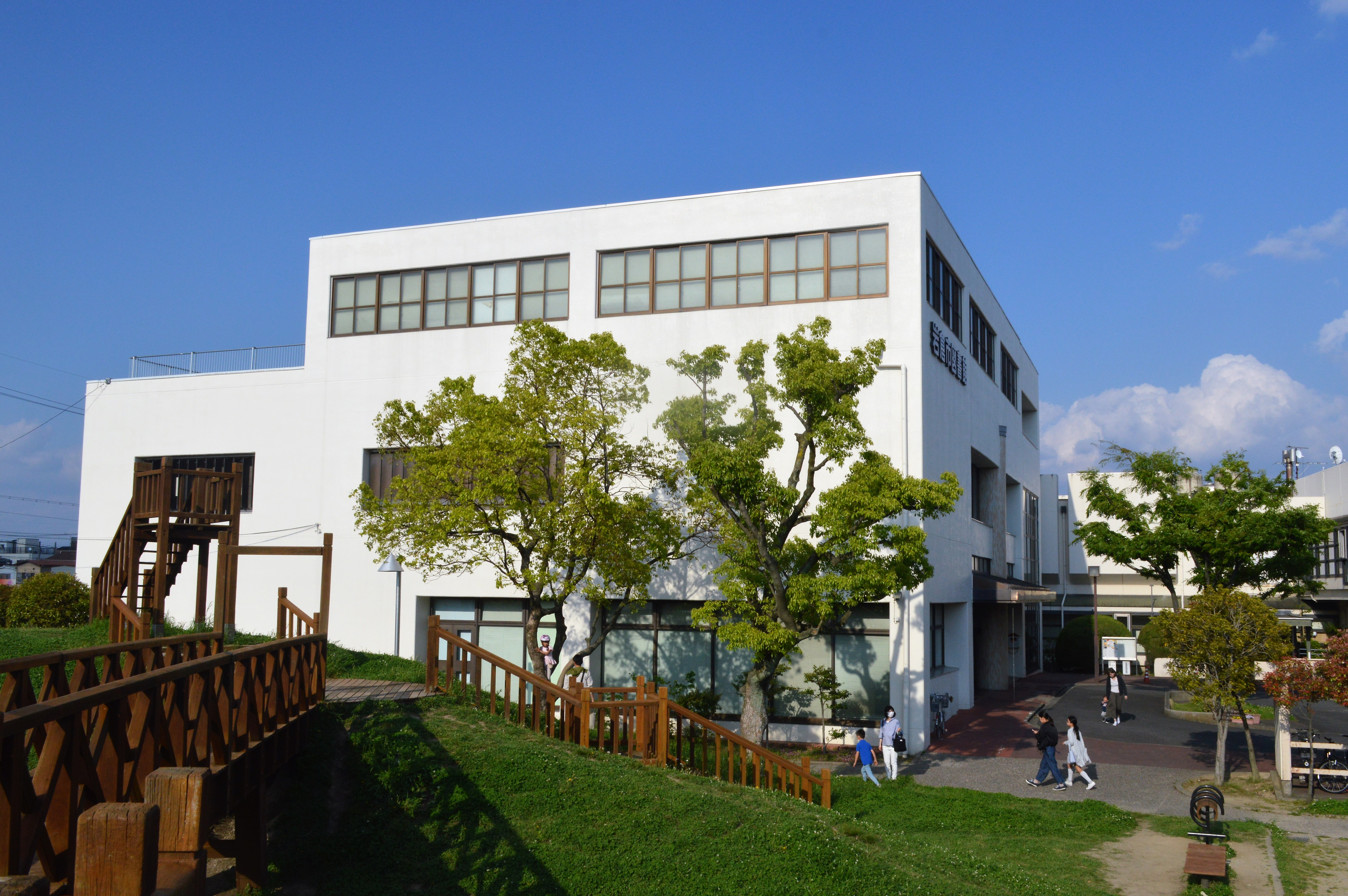 岩倉市図書館。手前は辻田公園。